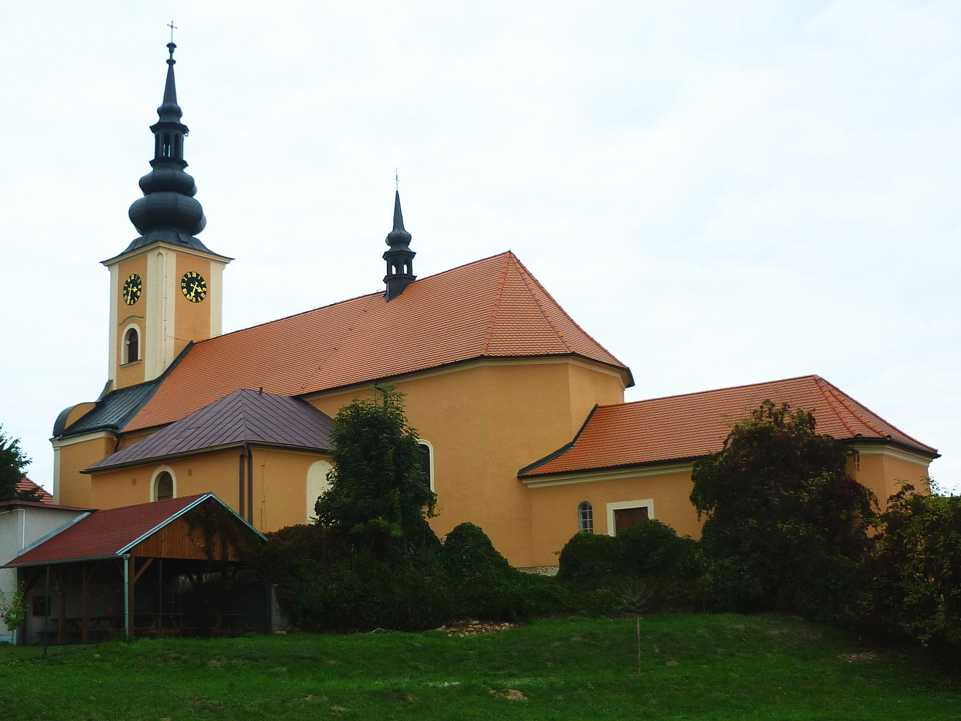 Kostel Všech svatých ve Staré Říši